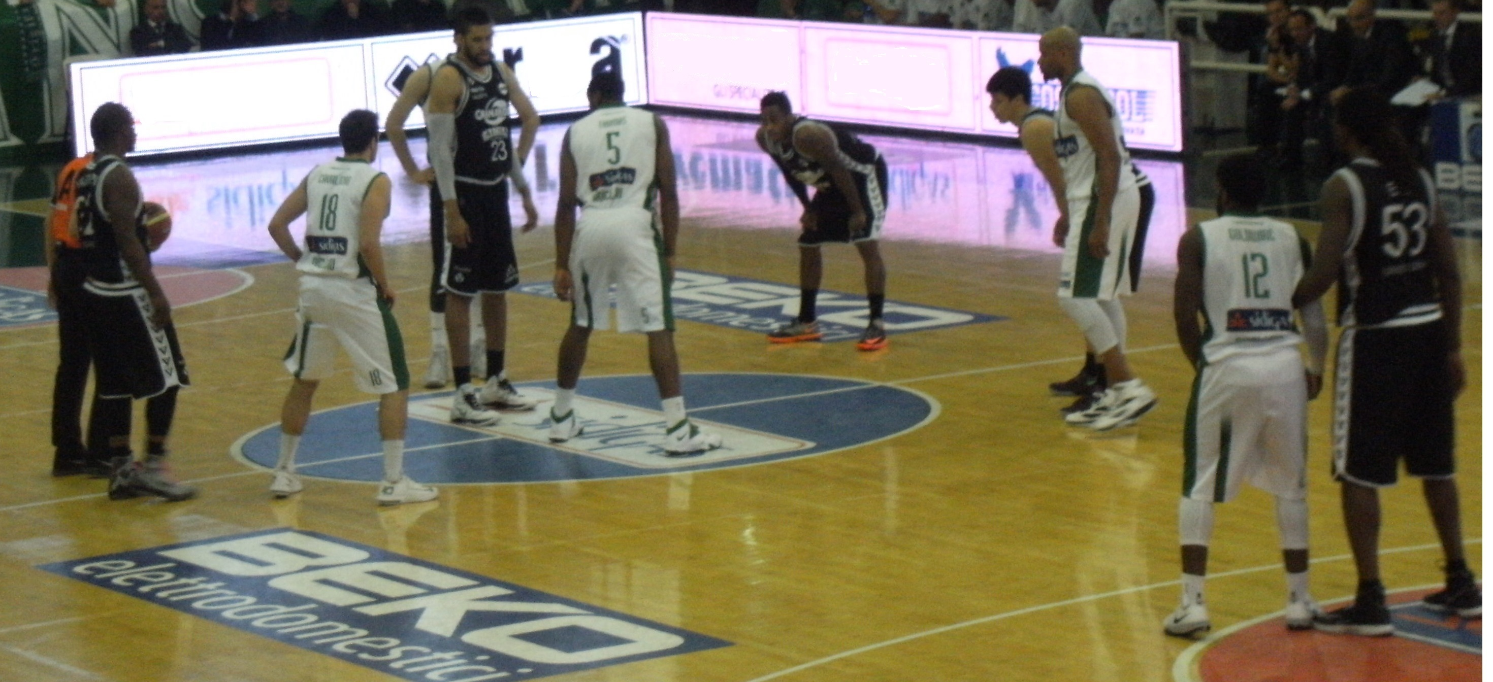 Felice Scandone Basket Avellino - Virtus Pallacanestro Bologna stagione 2013/2014 72/80 Palasport Giacomo Del Mauro di Avellino 06/04/2014